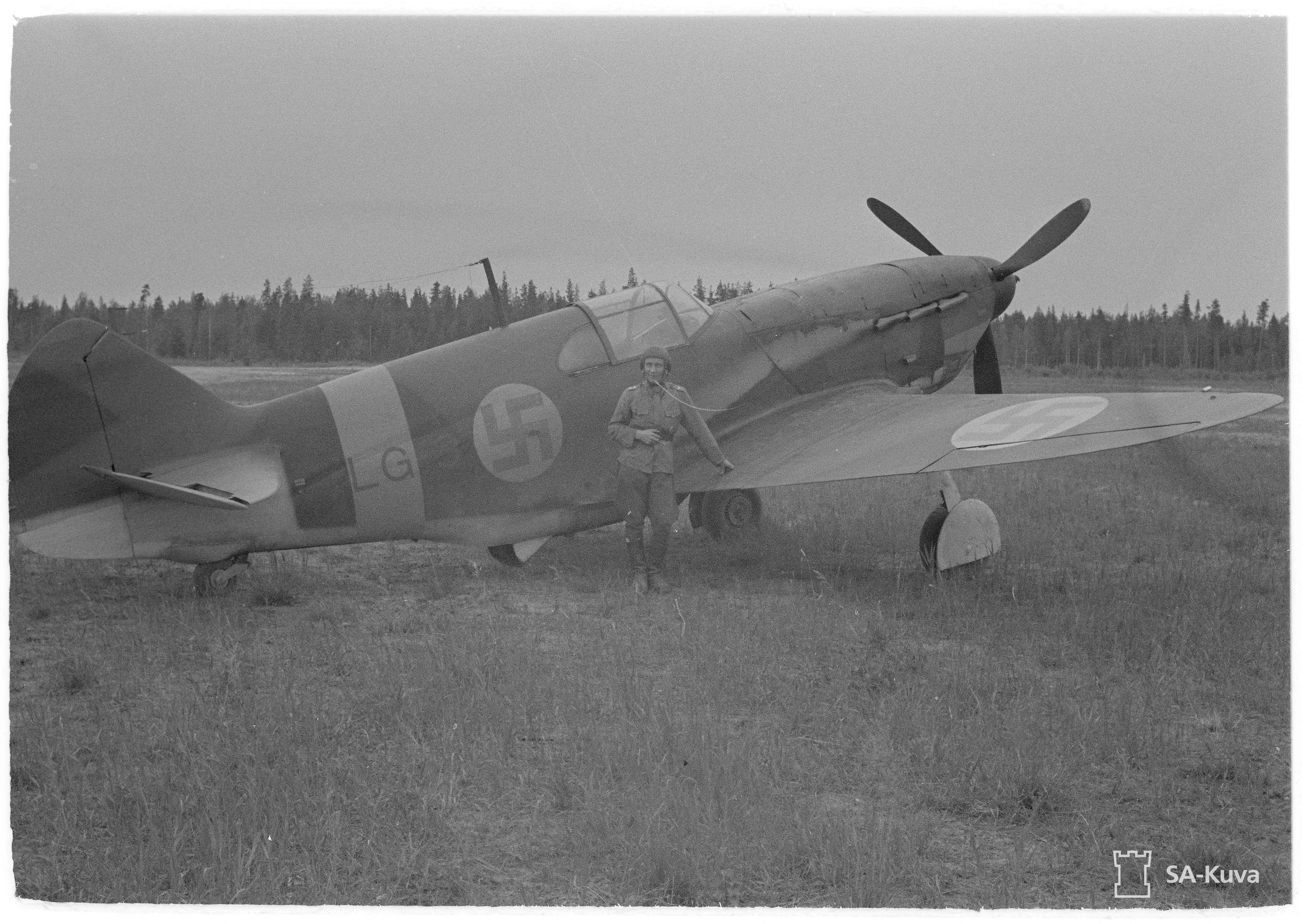 Ryssäläinen Lag-3 hävittäjä palvelemassa meikäläisiä uuden isäntänsä kanssa. (Kuvassa on Lavotškin LaGG-3) Kuvauspaikka: Mensuvaara